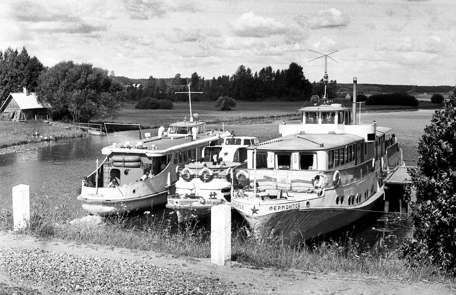 Värska sadam, Vanemuine vaheldumisi Lermontoviga